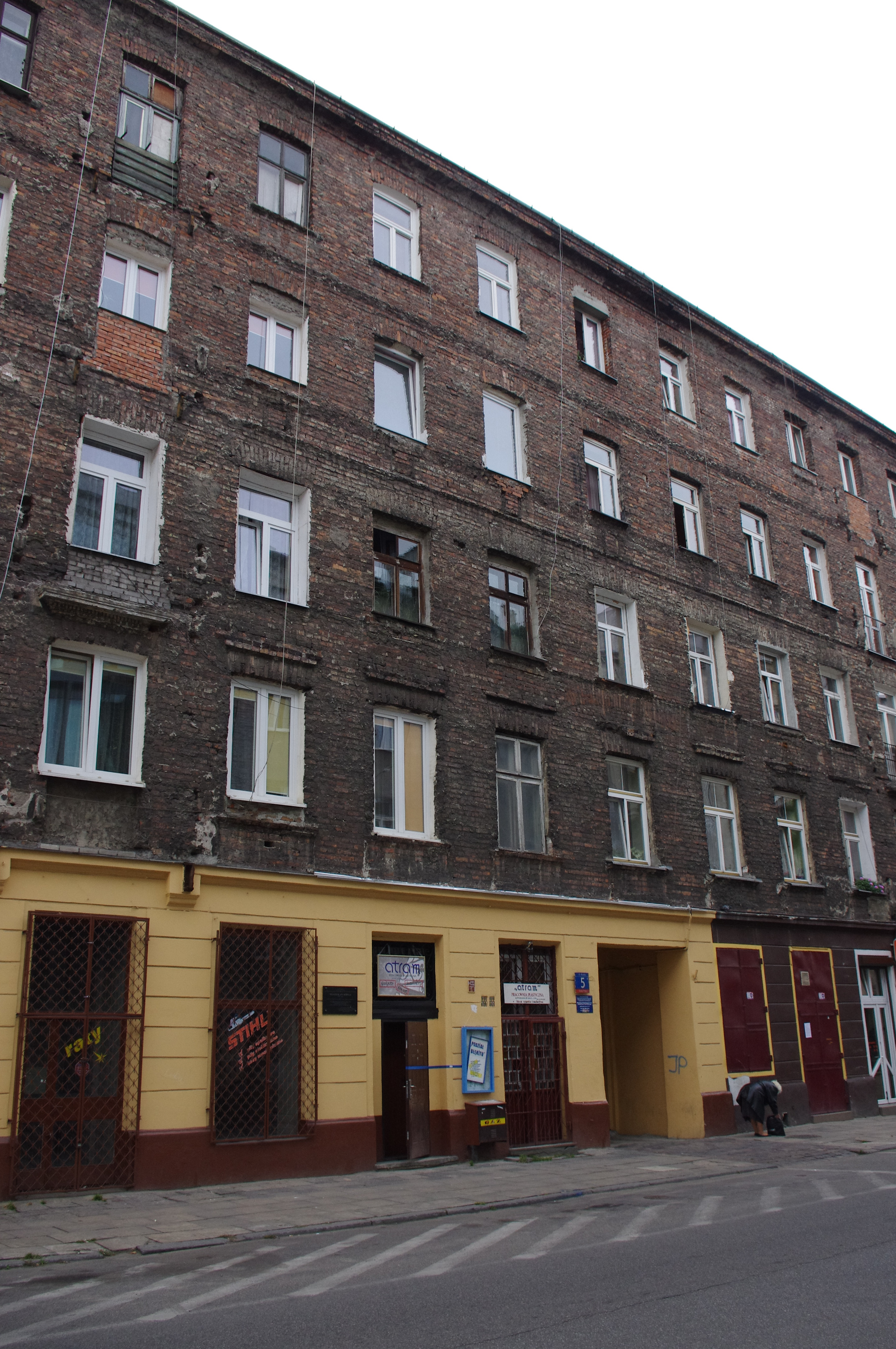 Kamienica na ul. Brzeskiej 5 w Warszawie, gdzie w latach 1932-1939 mieszkał poeta Władysław Sebyła i przez wiele kolejnych lat mieszkała jego żona – pisarka Sabina Sebyłowa